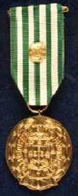 Medalha comportamento exemplar grau ouro